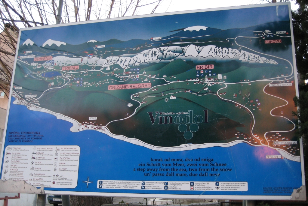 Plan općine Vinodolske